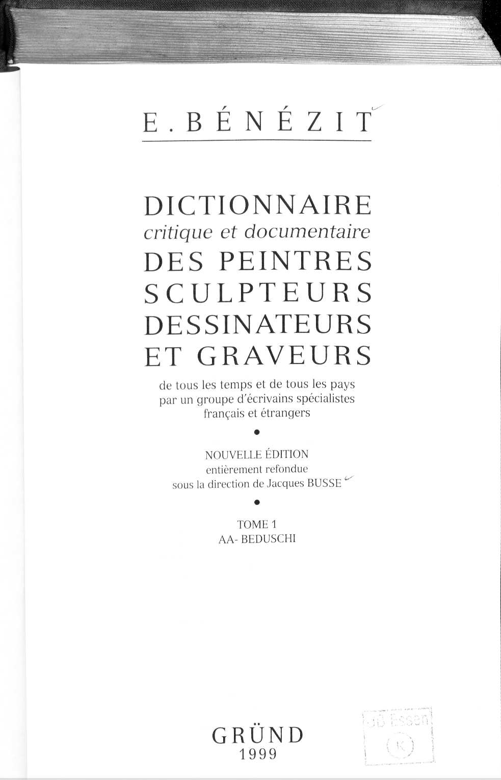 Emmanuel Bénézit: Dictionnaire critique et documentaire des peintres, sculpteurs, dessinateurs et graveurs de tous les temps et de tous les pays. Nouv. éd., entièrement réfondue = [4. éd.]. Paris : Gründ, 1999